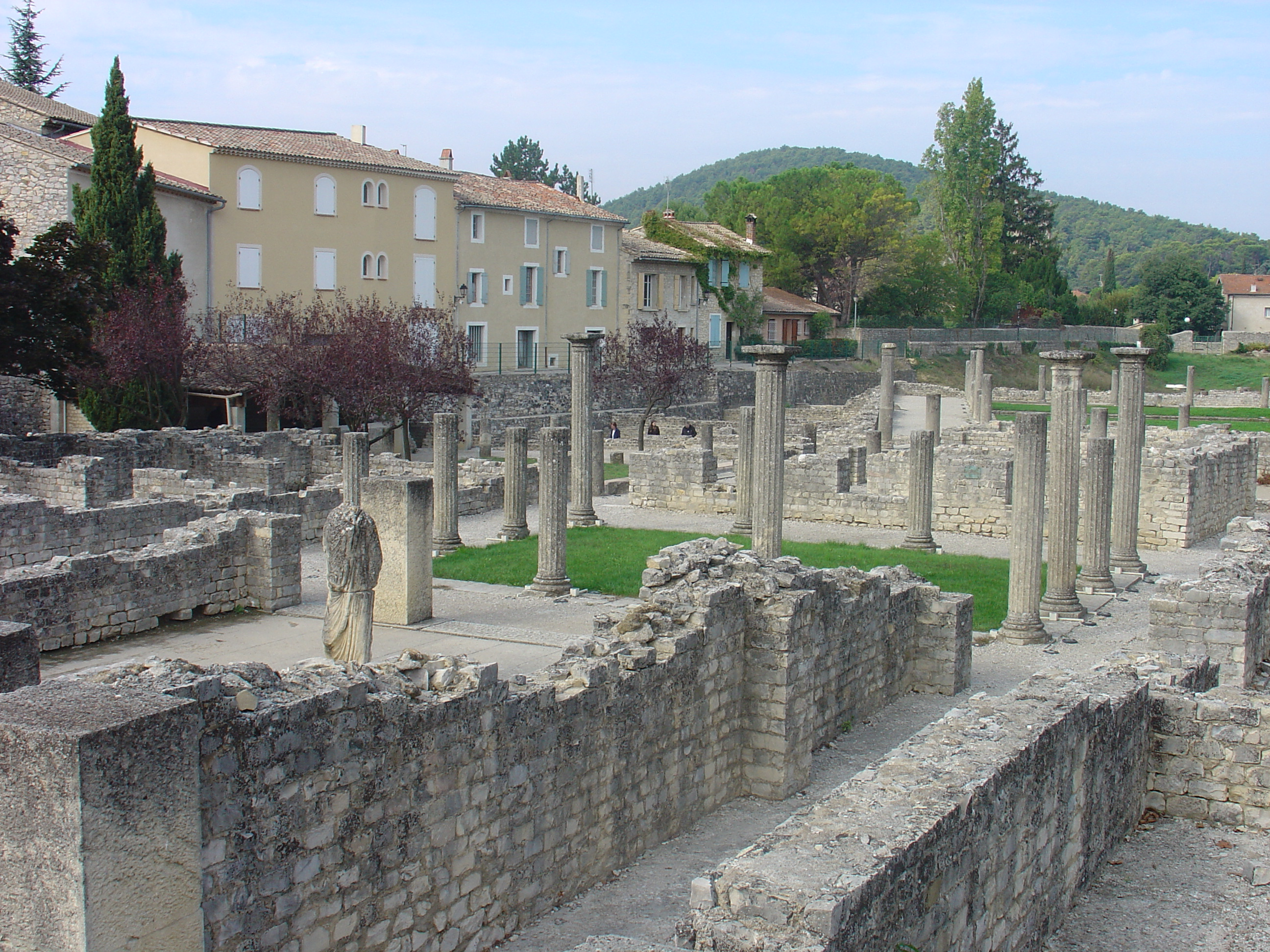 Vaison